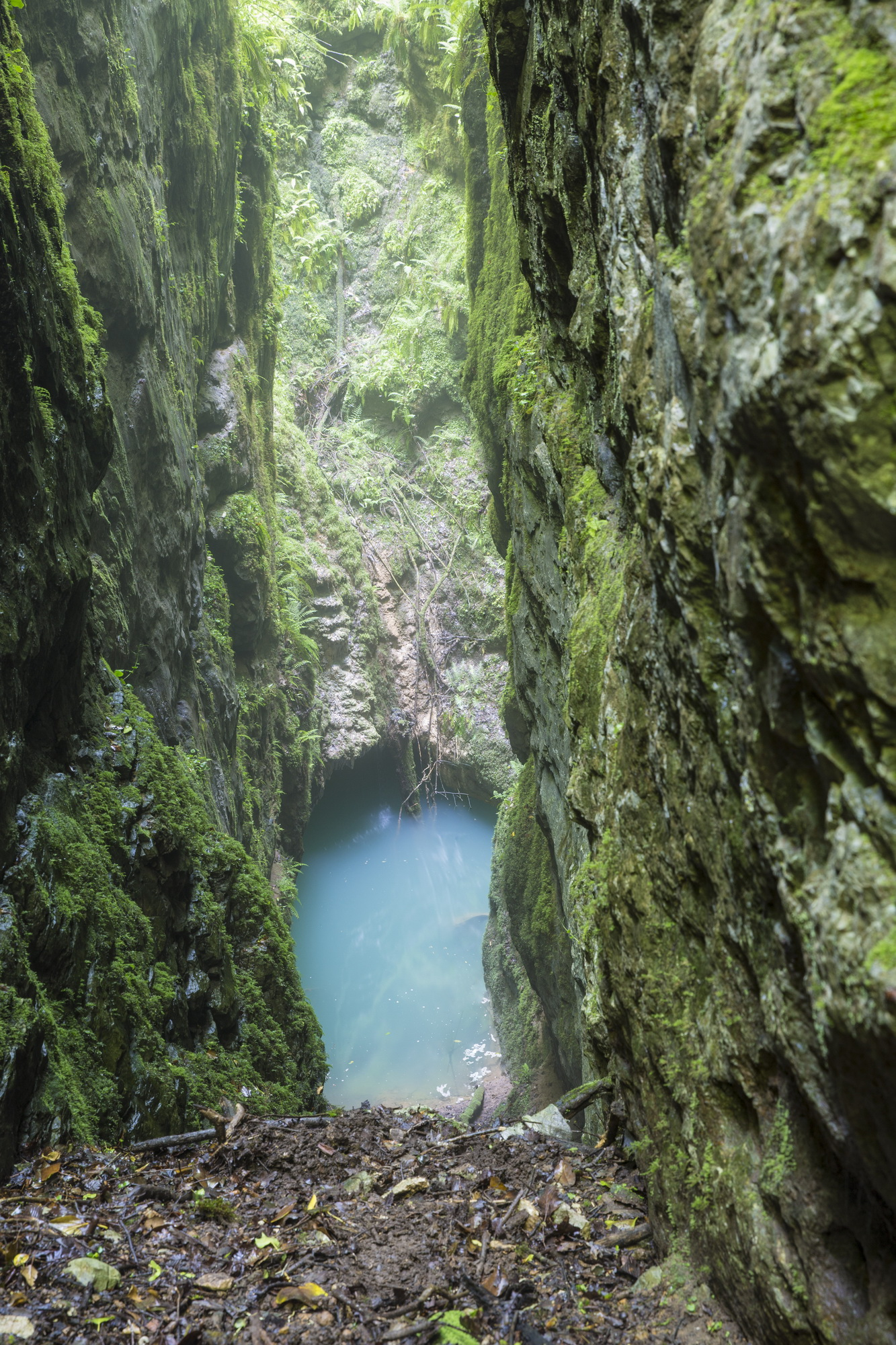 გაბზარული ტბის ბუნების ძეგლი ღირშესანიშნაობა: ბუნების ძეგლი წარმოადგენს ზედაპირზე დაახლოებით 5 მ სიგრძის, 4,5 მ სიგანის და 60 მ სიღრმის მდ. ყუმის ნაპრალურ სიფონს, ძაბრს - ღრმა კანიონს, რომელიც ტექტონიკური რღვევით (1300-3100) გაჩენილ 45 მ სიღრმის ღრმულს, რომლის ფსკერი სიფონურ ტბას უკავია. სოფლის მოსახლეობა მას “წკვარამსაც” უწოდებს. ”გაბზარული ტბის“ წყალს სოფლის მაცხოვრებლები თავდაპირველად სასმელად იყენებდნენ, ამჟამად კი - სათევზაოდ და საბანაოდ.